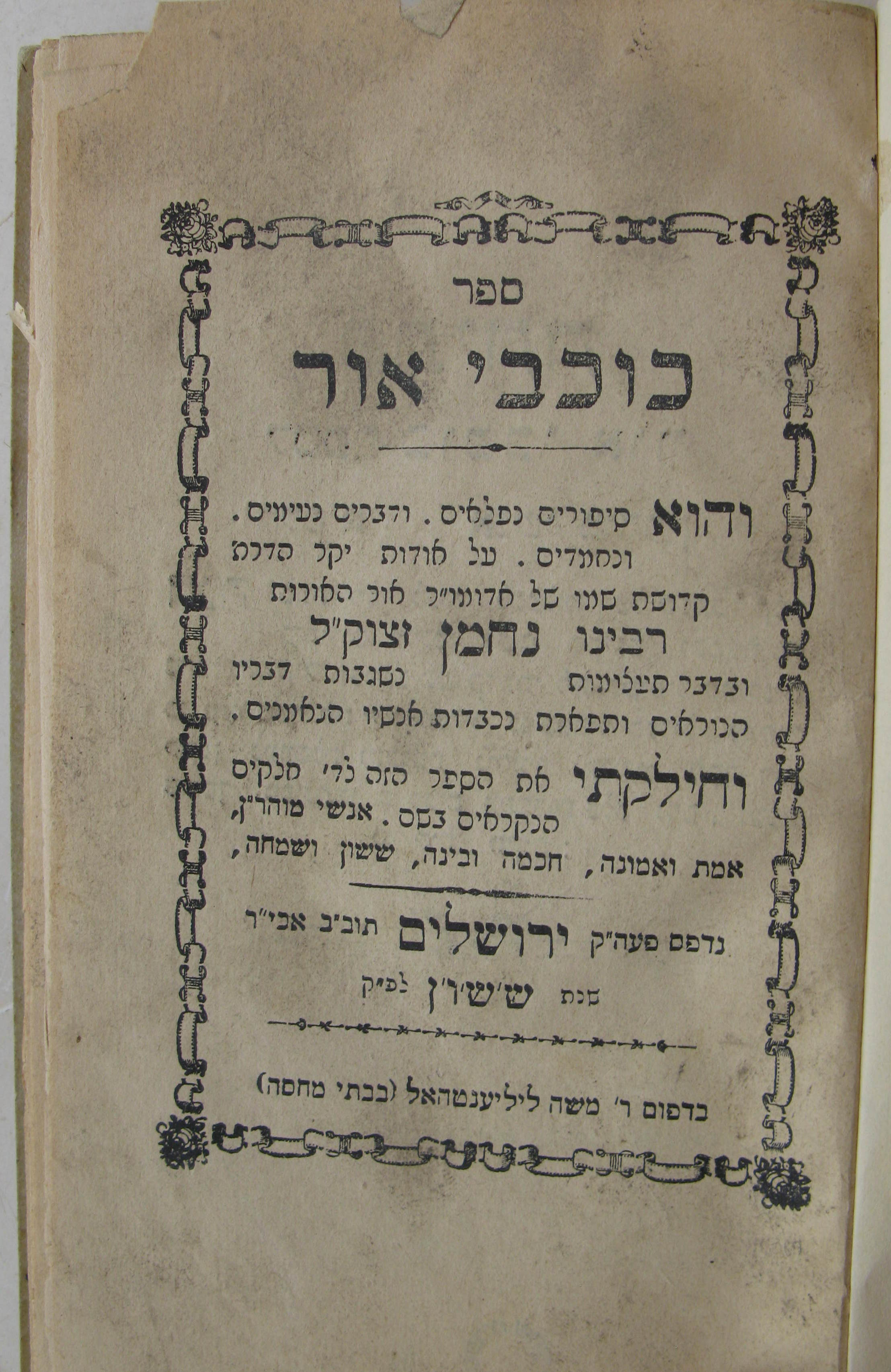 צילום שער הספר כוכבי אור דפוס ראשון